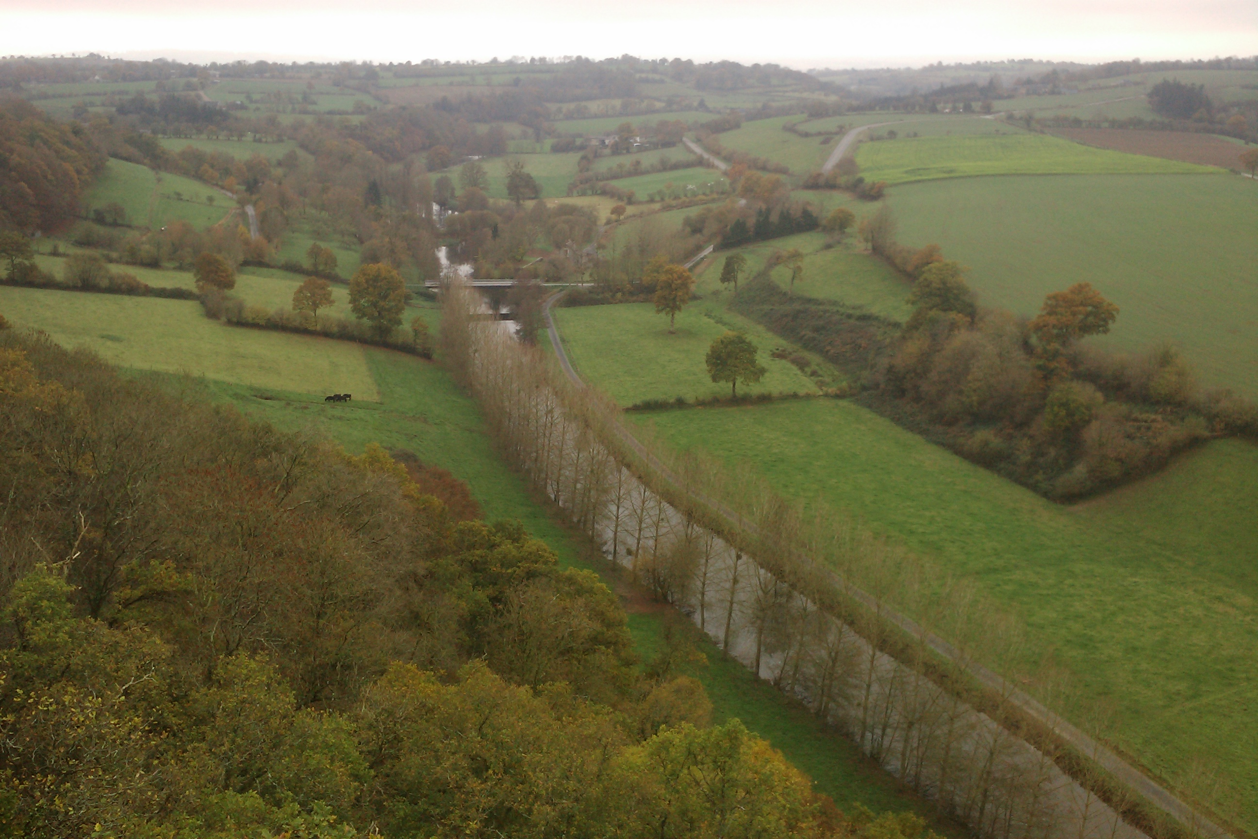 Vue sur les et la Vire (fleuve) et son bocage normand